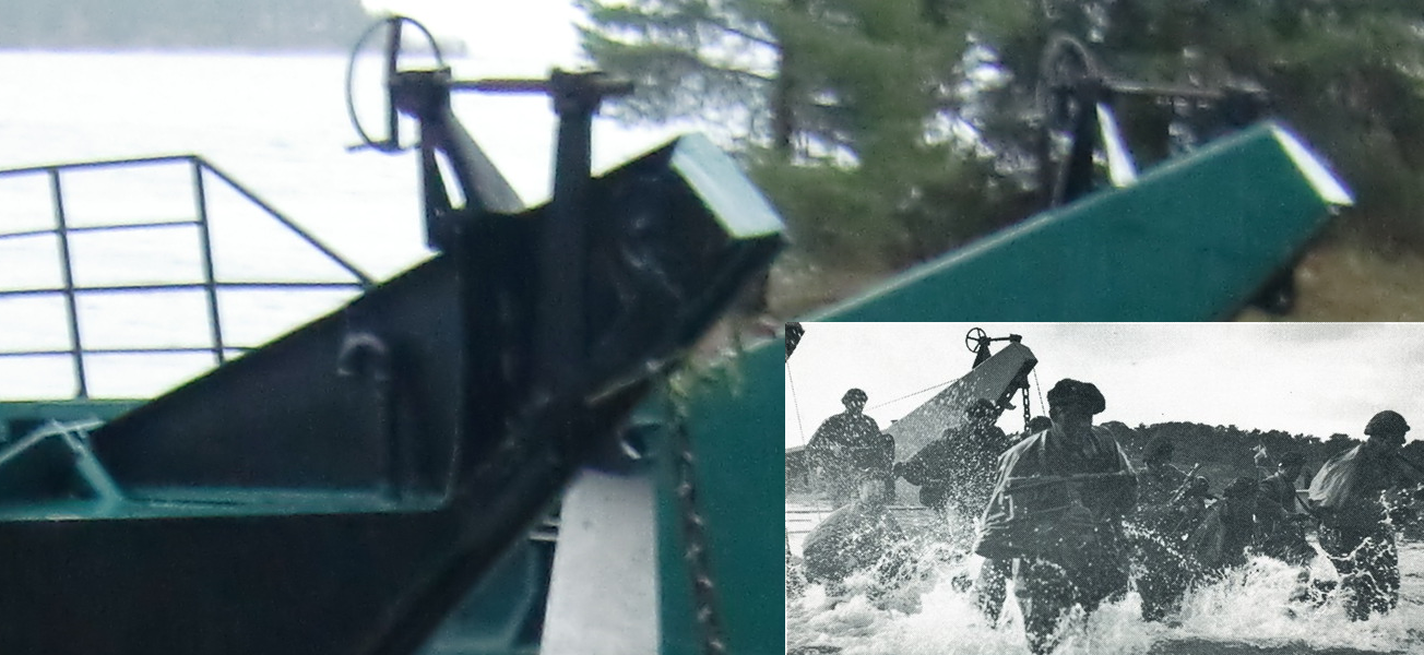 Norsk (bokmål): Baug før og etter ombygning.